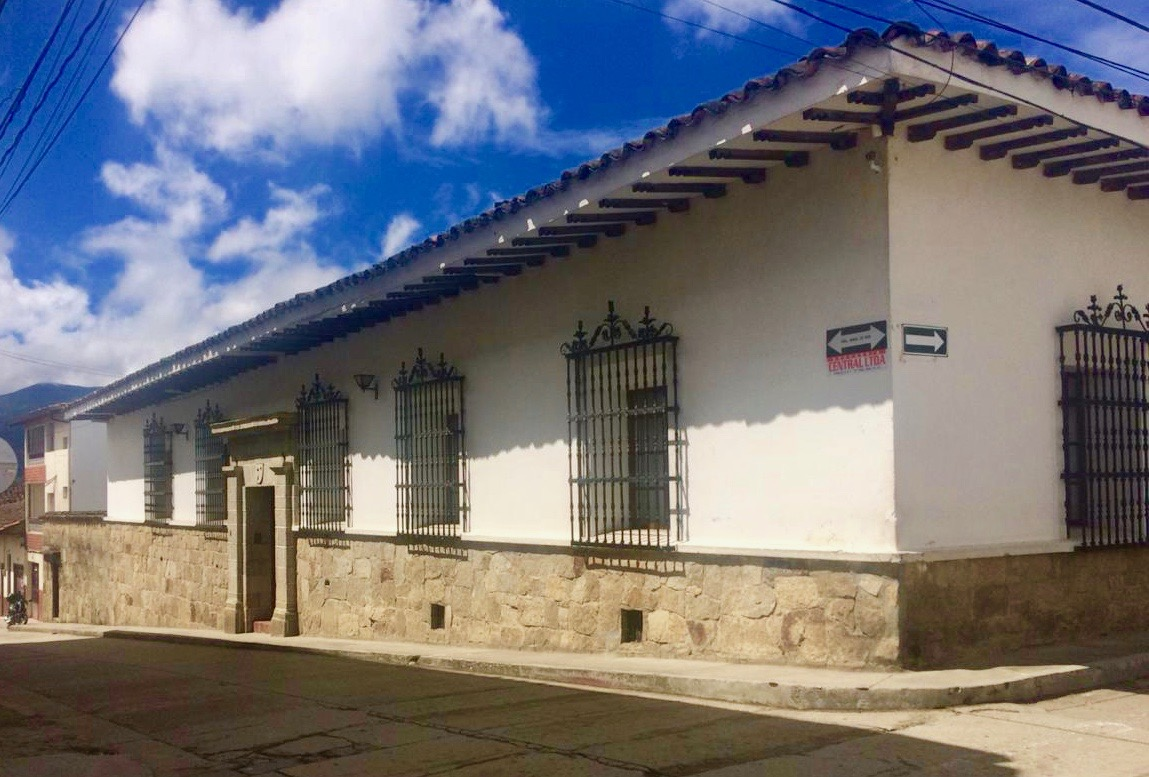 Residencia oficial del Obispo de Sonsón-Rionegro, diseñada por el arquitecto Nel Rodríguez Hauesler en 1957.